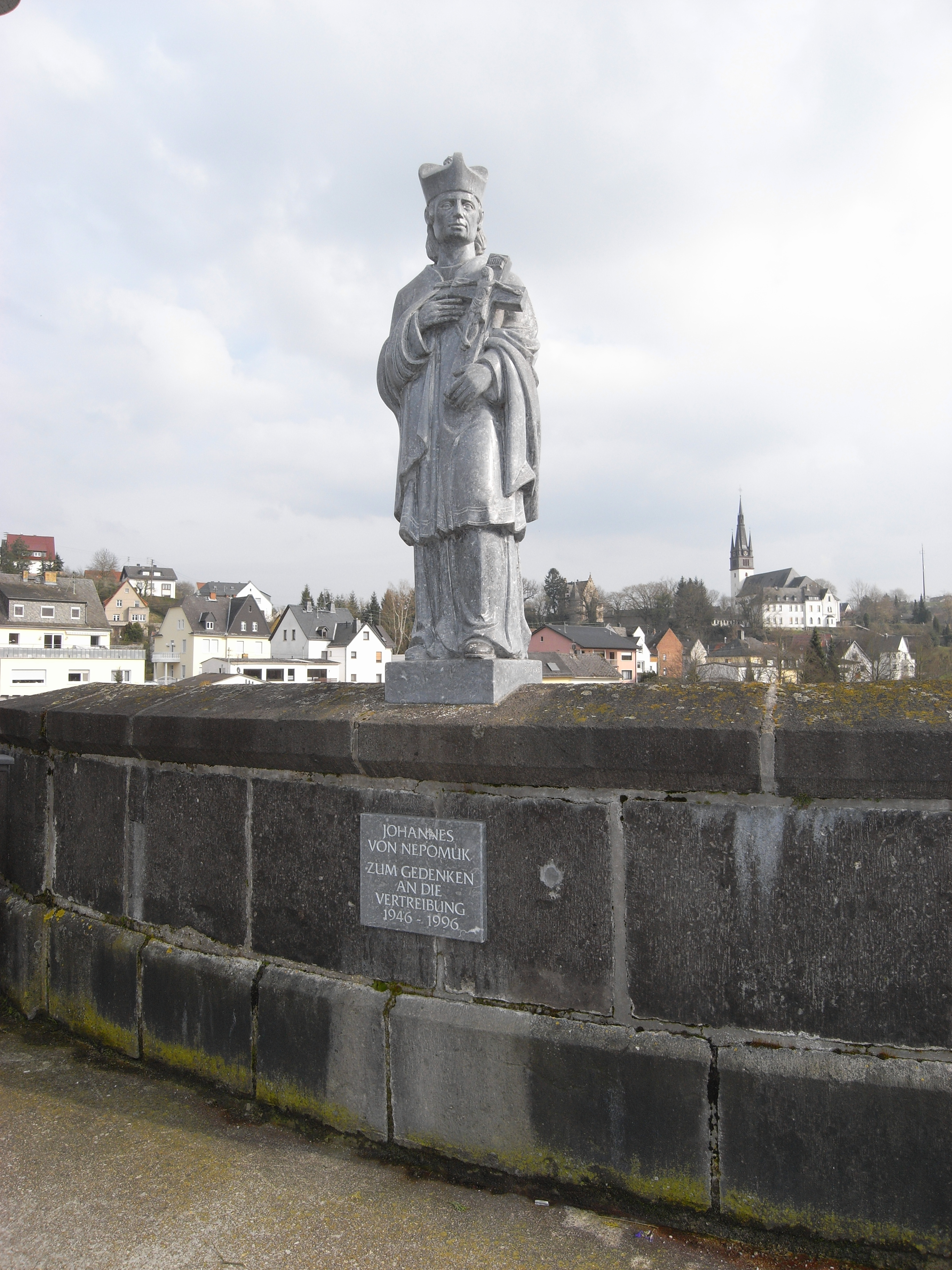 Nepomuk-Statue auf der Lahnbrücke in Villmar aus Wirbelau-Marmor